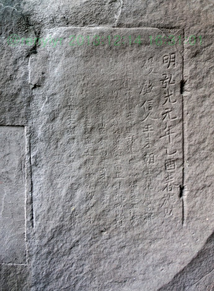 重慶府合州迴龍鄉弘光元年的石刻